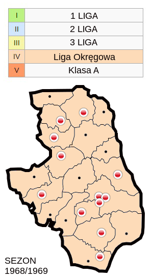 Jagiellonia w sezonie 1968/69- mapa klubów